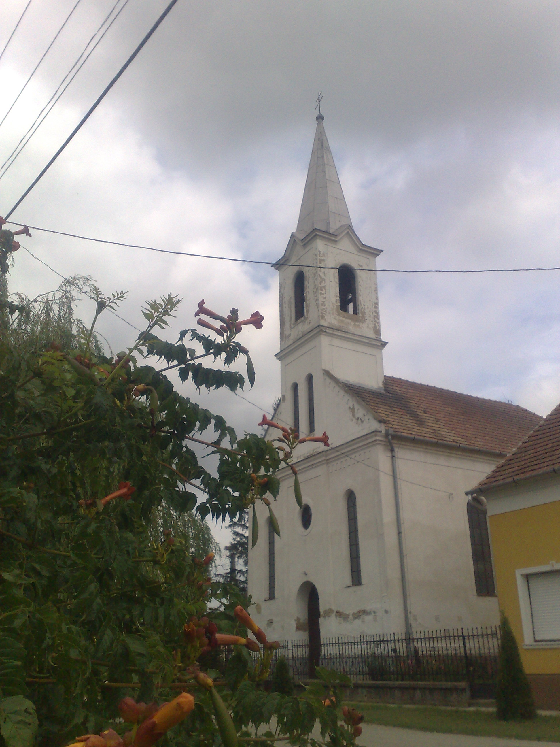 Evangélikus templom Sobor községben